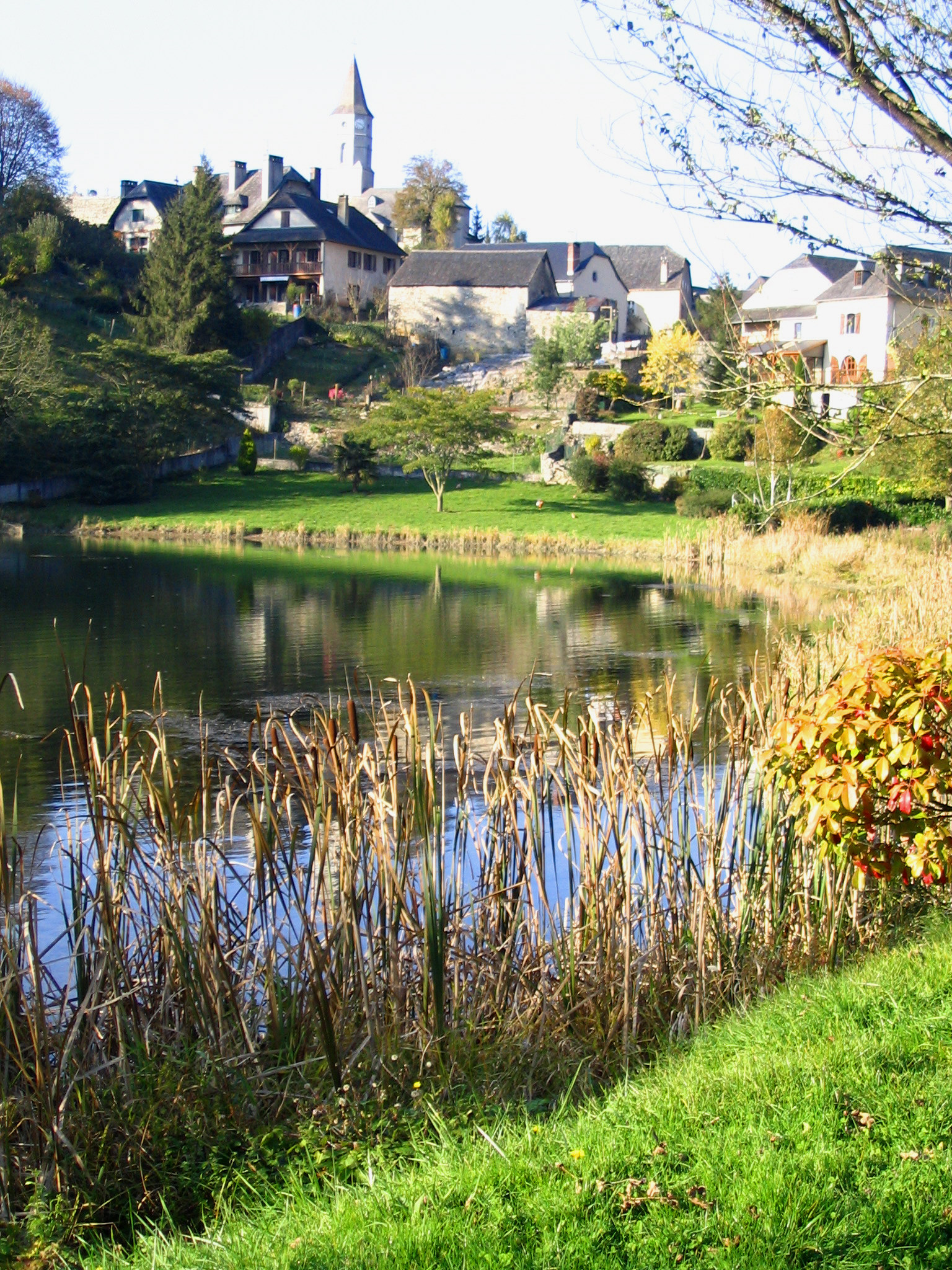 Village de Castet - Pyrénées Atlantiques - France